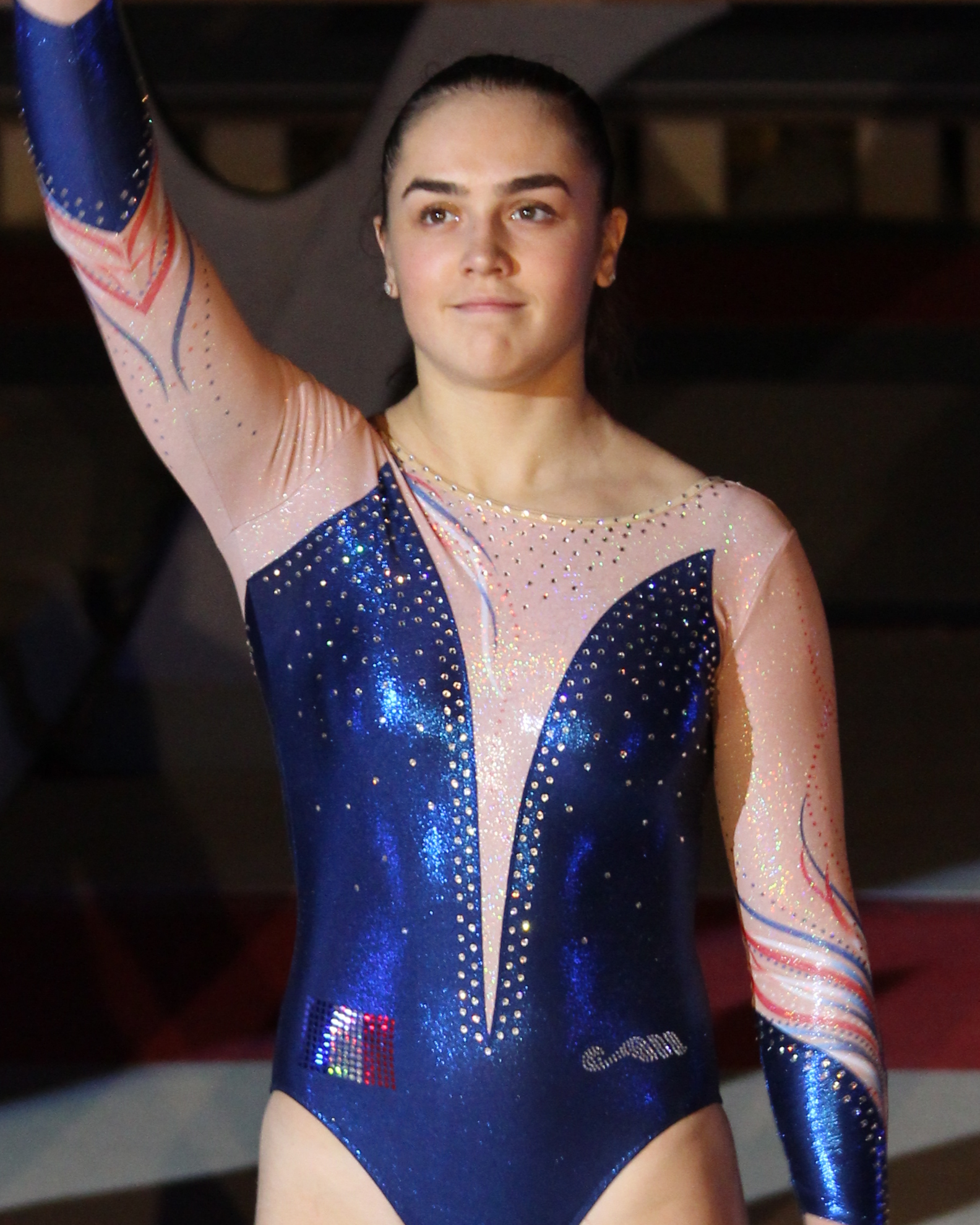 Louise Vanhille lors du Sainté Gym Show 2018.